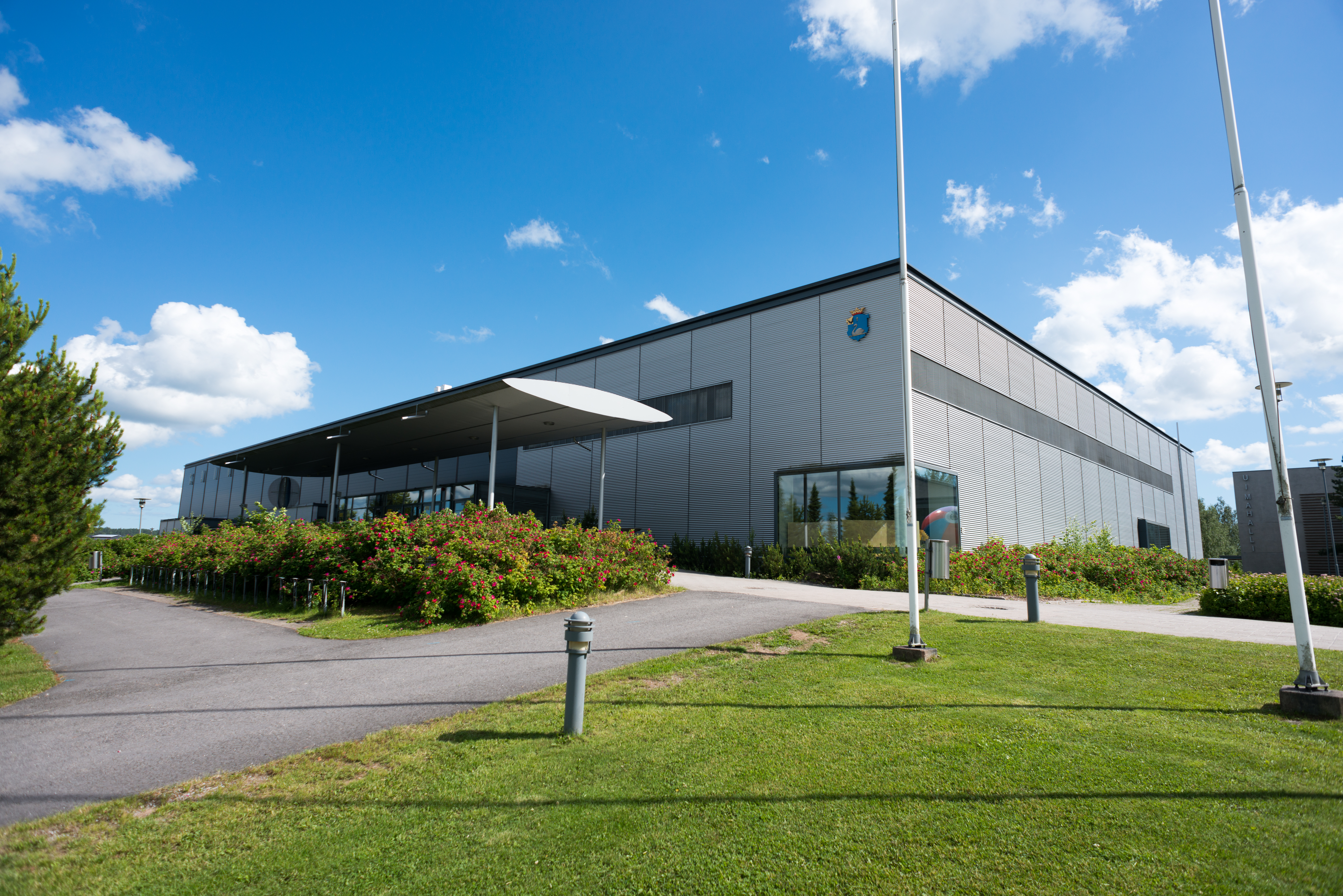 Salohalli Salossa